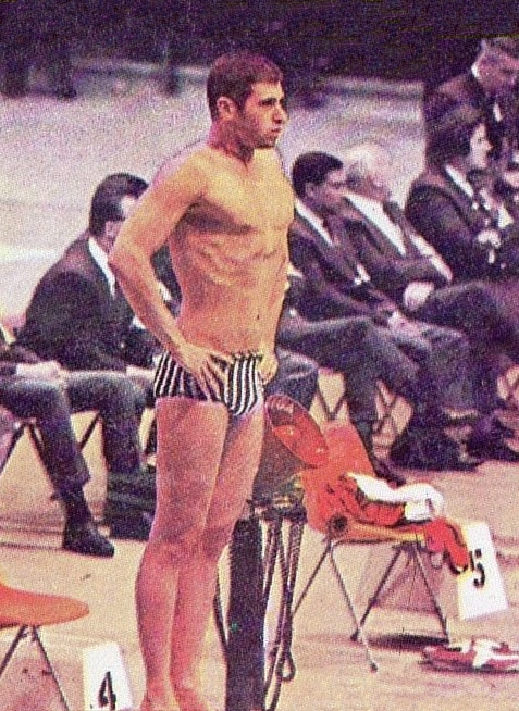 MUNCHEN/MONACO '72-PANINI-Figurina n.191- FIOLO - BRASILE -NUOTO-Rec